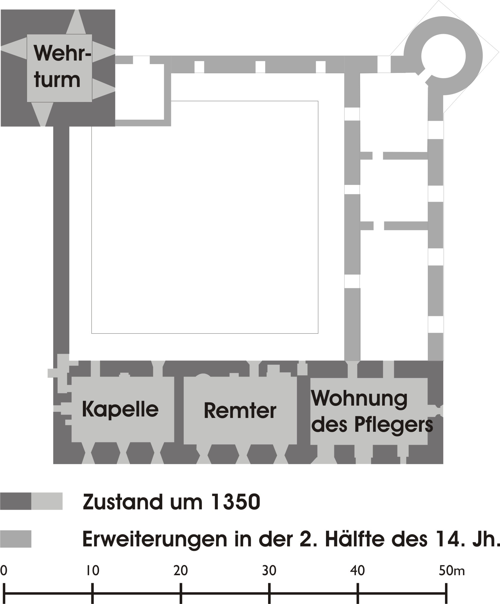 Grundriss der Deutschordensburg Soldau